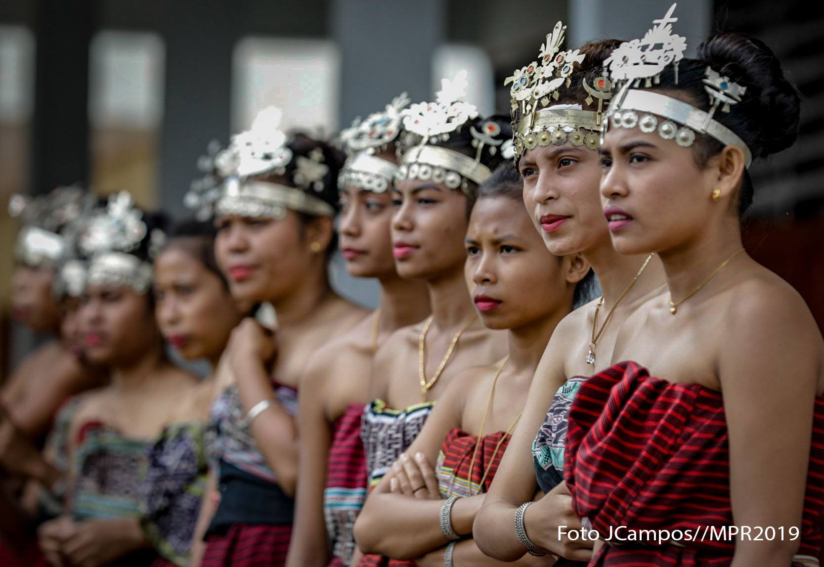 Frauen in traditioneller Kleidung in Suai